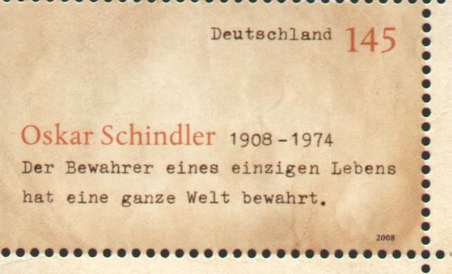 марка